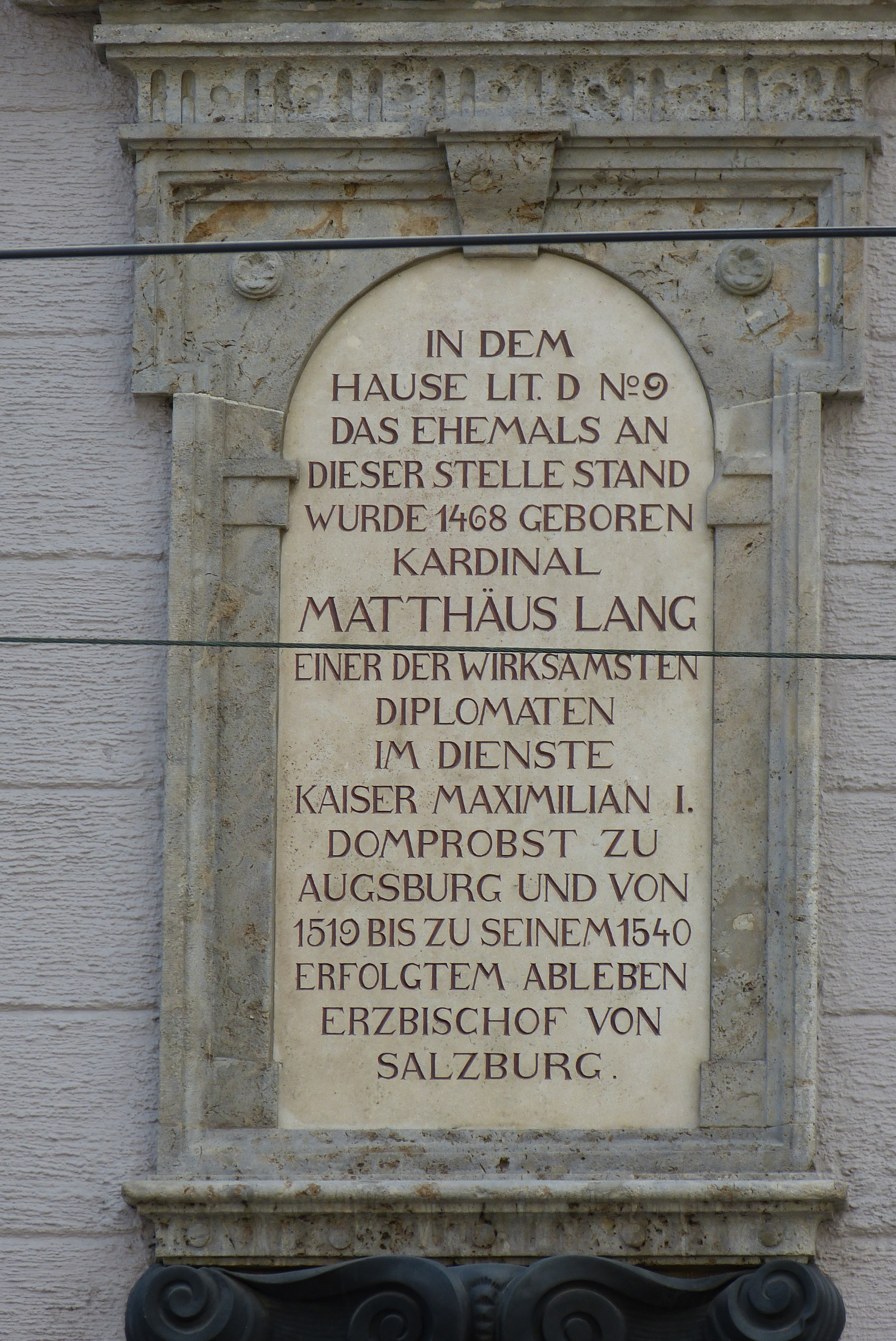 Tafel am Haus in Augsburg, Maximilianstraße 4